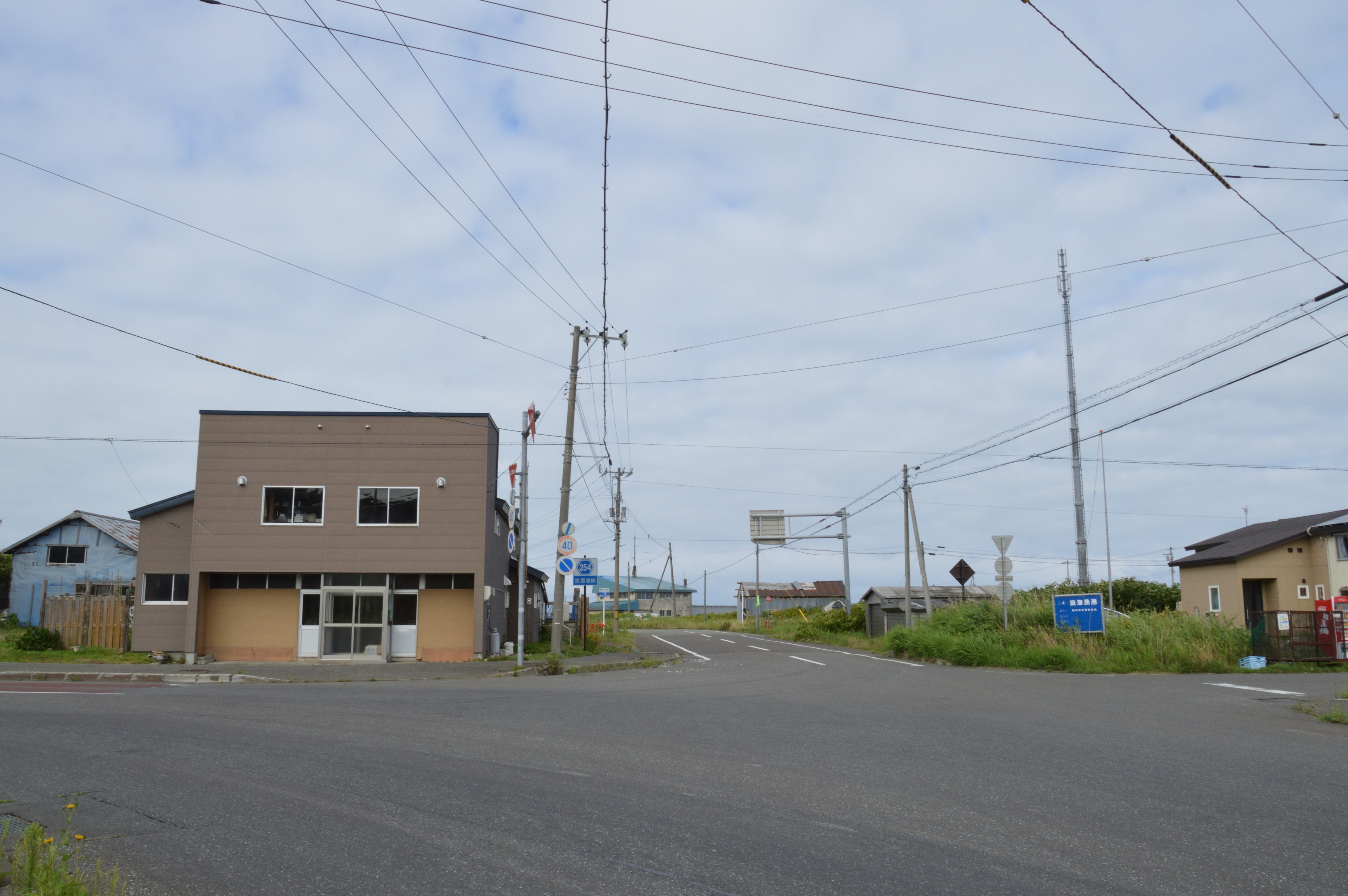 北海道道254号抜海港線（道道106号との分岐・合流 稚内市抜海村字バッカイ） Nikon D3200